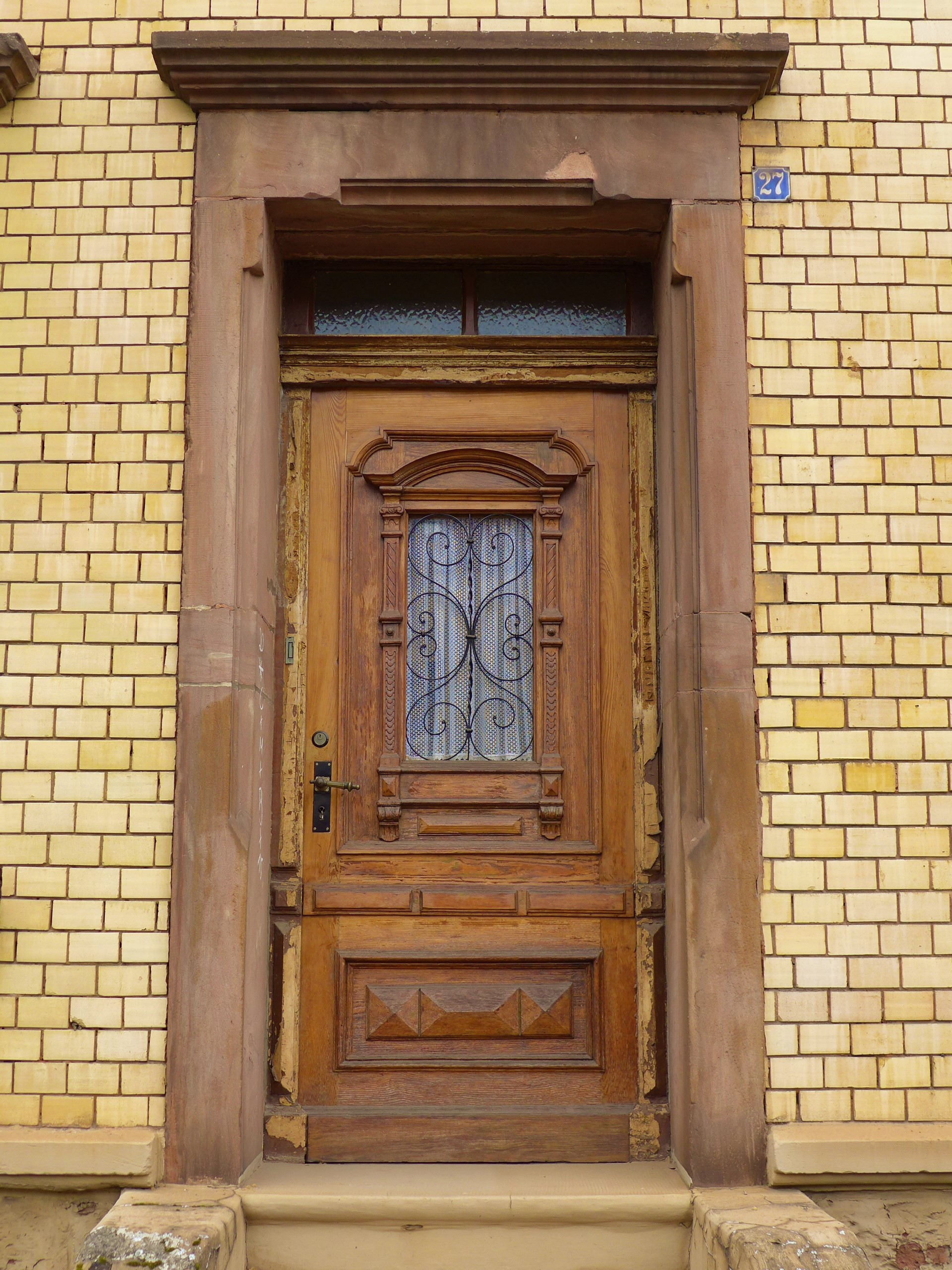 Diefflen, Haustür in der Dillinger Straße im Stil der Neorenaissance mit Gewänden aus Sandstein